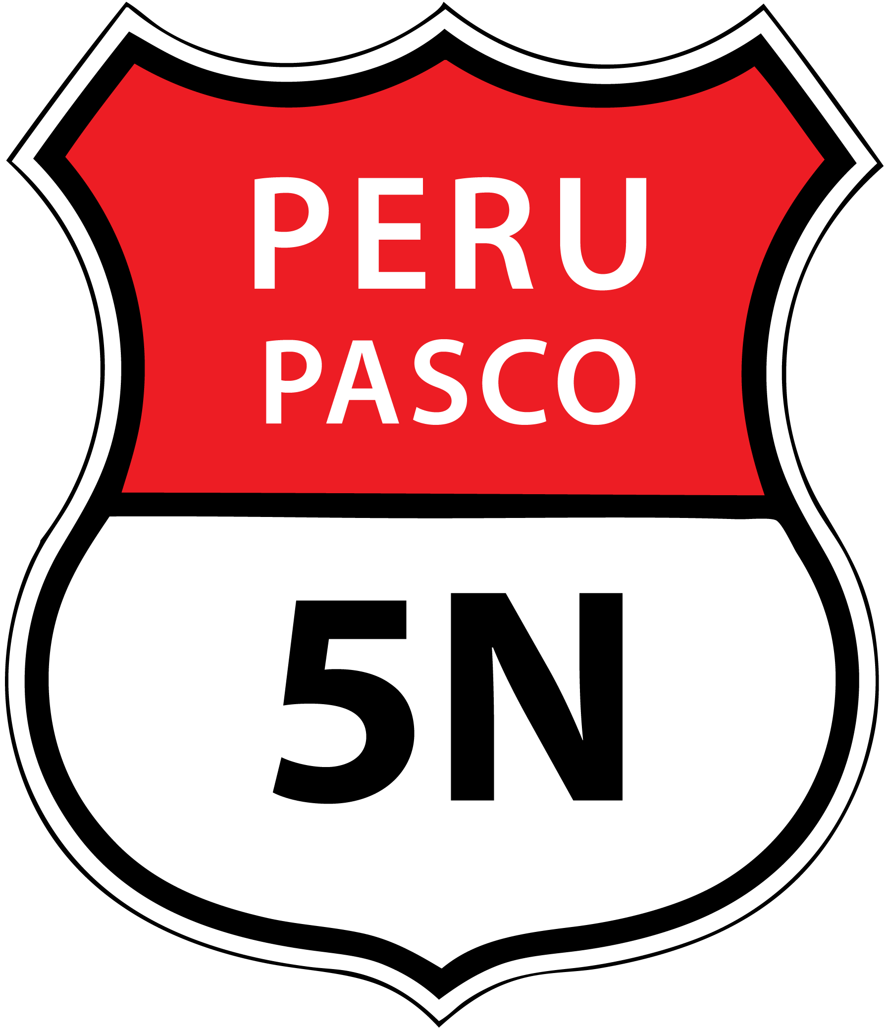 Disco de Identificación Ruta Nacional PE-005N